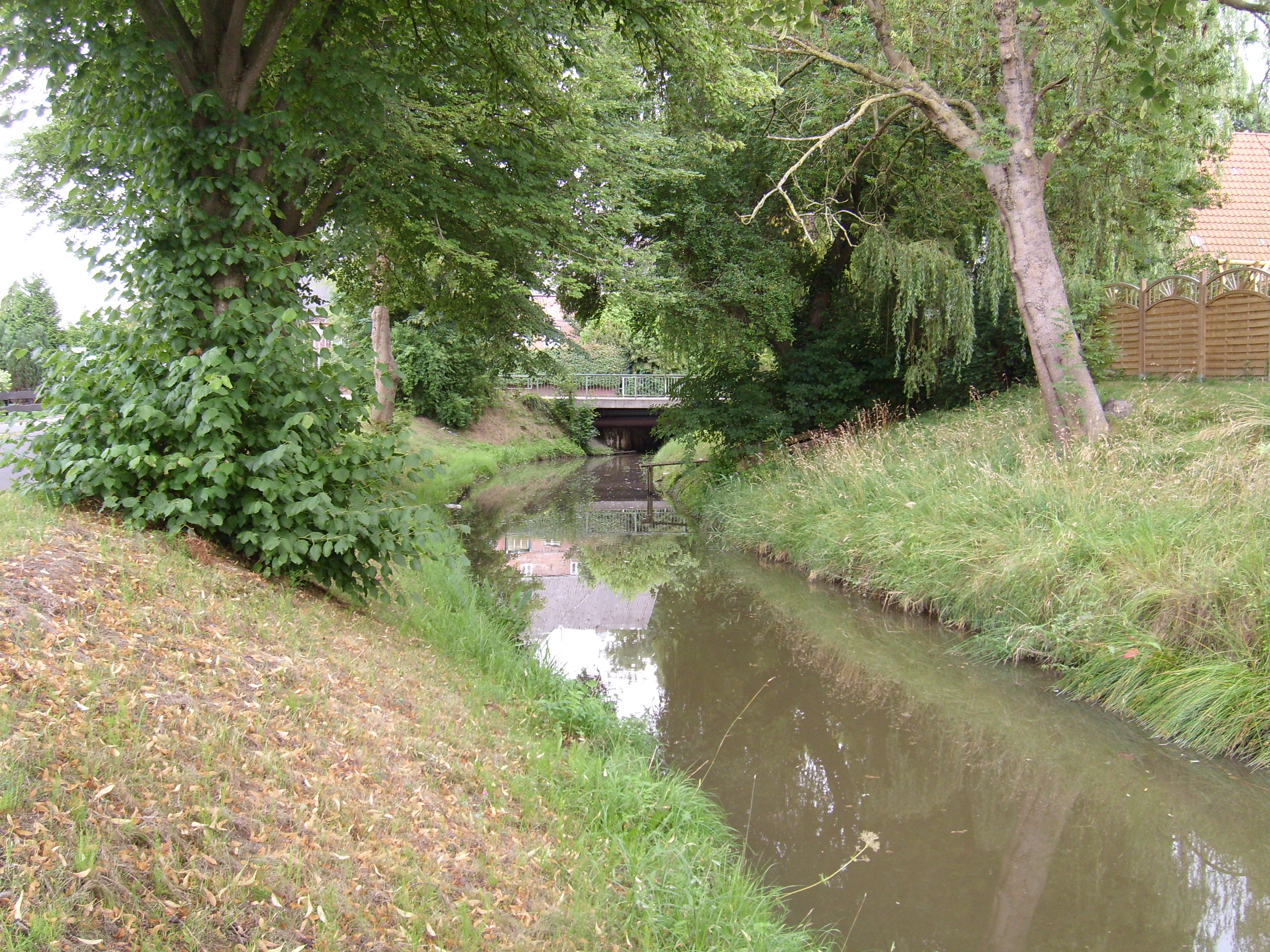 Die durch Wewelsfleth verlaufende Humsterdorfer Wettern